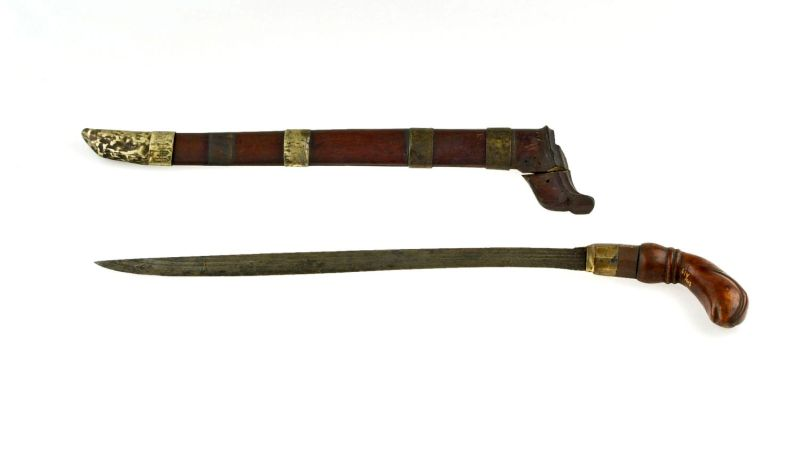 Dolk. Dolk met knievormig omgebogen houten greep en houten schede Unknown language: Badik